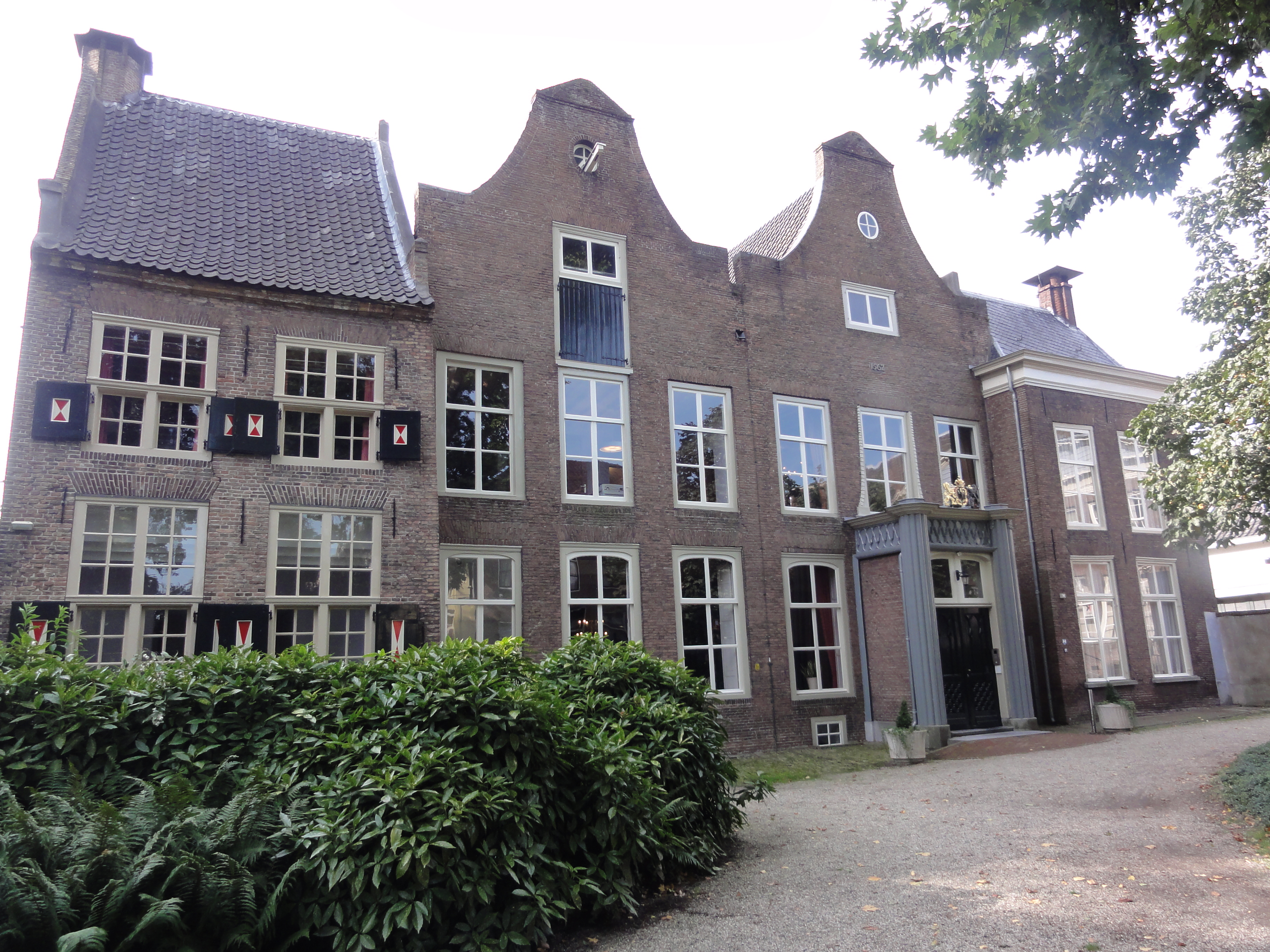 Tiel Rijksmonument 35556 Ambtmanshuis en voormalig gemeentehuis, tuinzijde 88″ N, 5° 26′ 01.15″ E